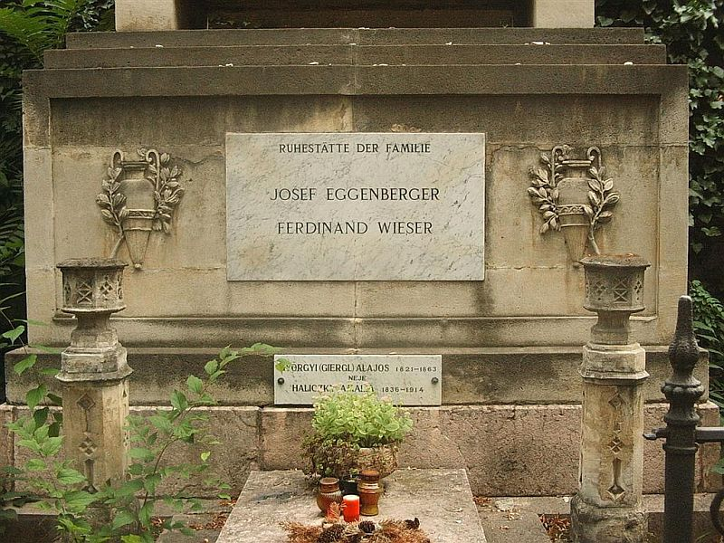 Györgyi Giergl Alajos, Joseph Eggenberger, Ferdinand Wieser családjának sírja Budapesten. Kerepesi temető: J. 98.